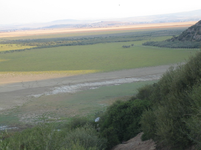 photo réalisée en août 2006 et offerte par Sadok GHARBI